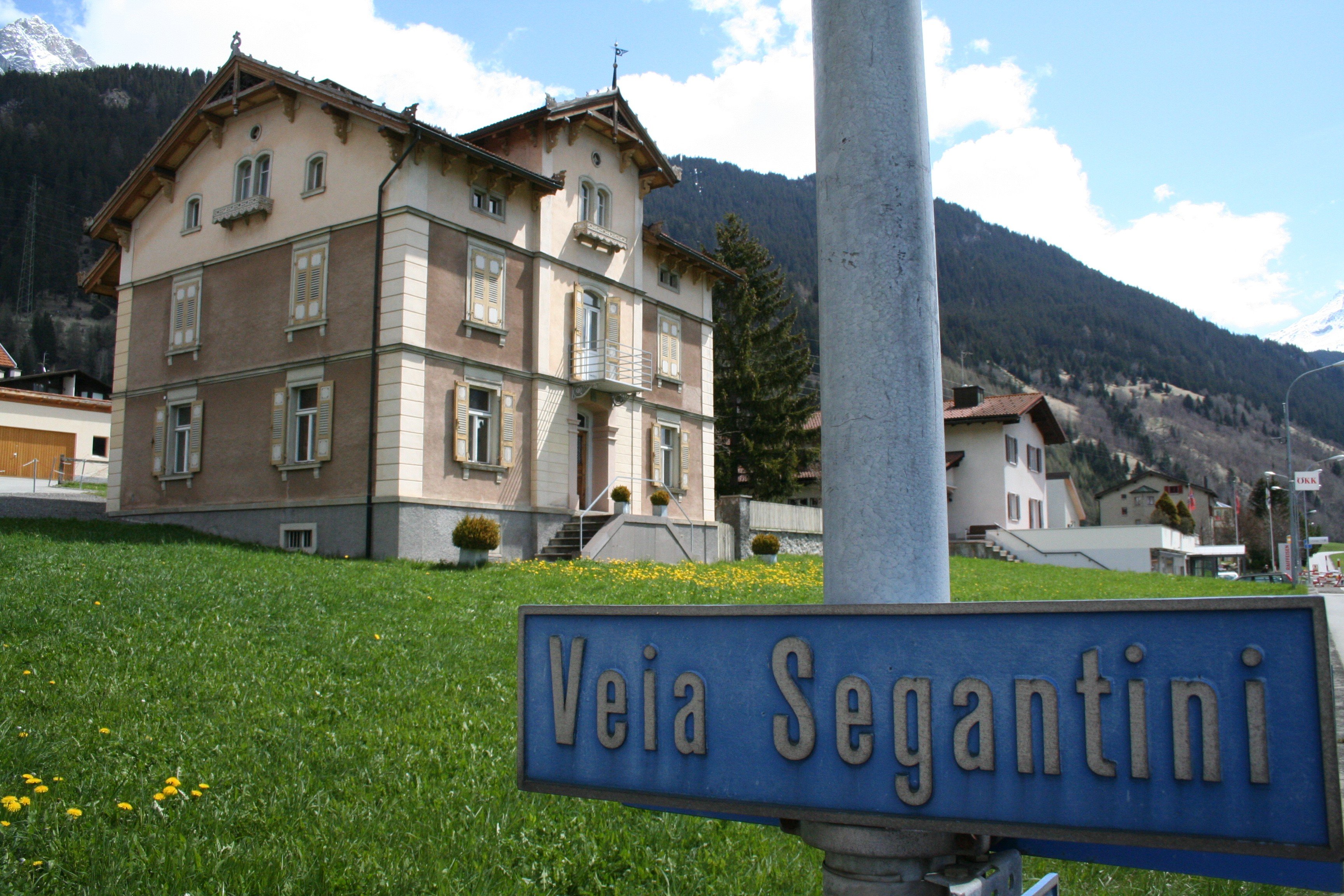 Segantinis Wohnhaus in Savognin Rumantsch: La tgesa da Segantini a Savognin